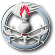 Fregio genio guastatori, esercito italiano